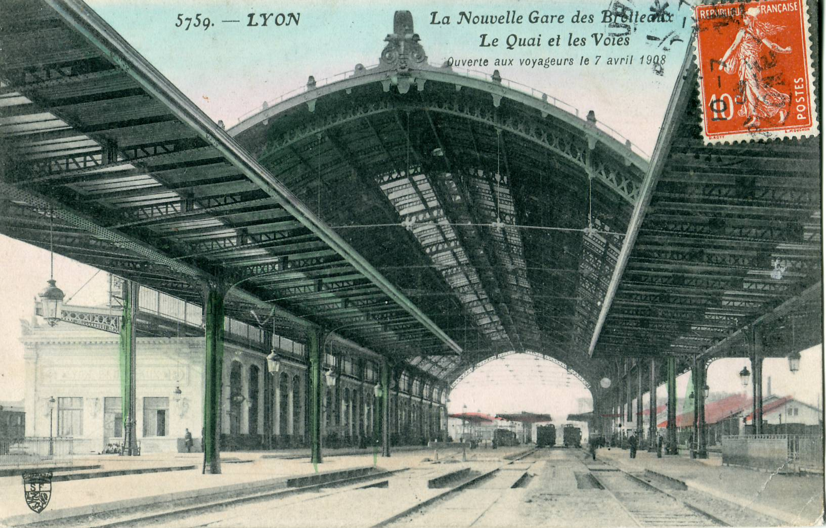 carte postale ancienne éditée par SF N° 5759Lyon : La nouvelle Gare des Brotteaux - Le quai et les voies, ouverte aux voyageurs le 7 avril 1908.